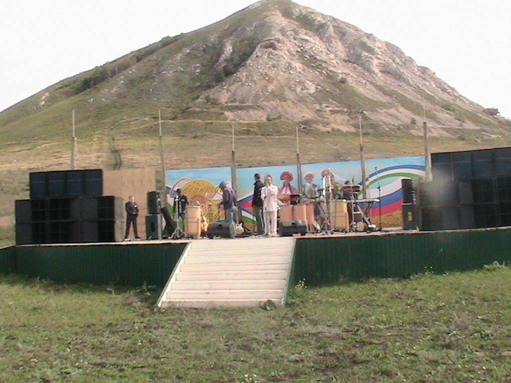 Кураист Роберт Юлдашев выступает со сцены с речью о защите шиханов Юрактау, Торатау, Куштау